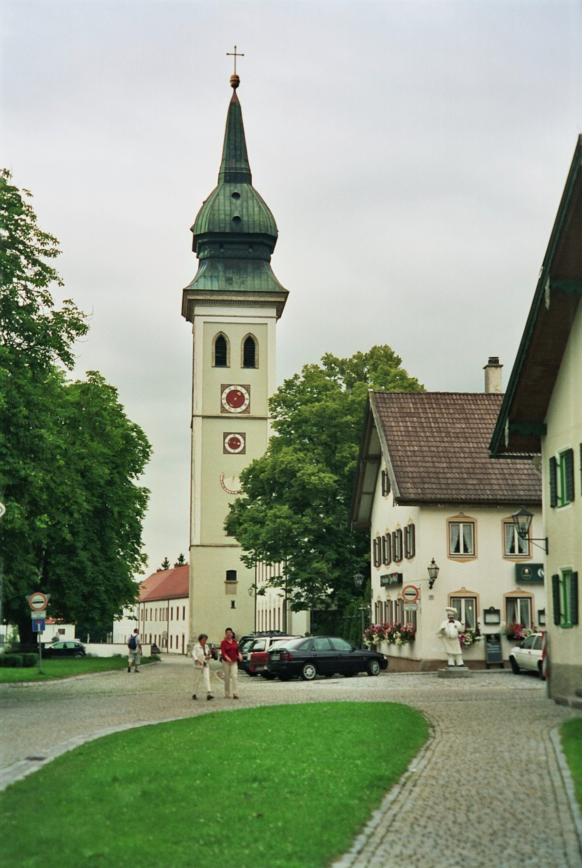 Der Kirchturm der Rottenbucher Klosterkirche